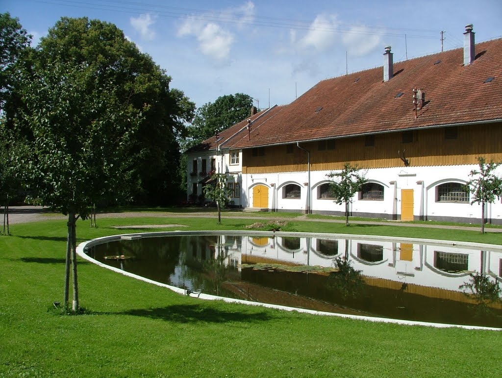 Buxheim Stadel